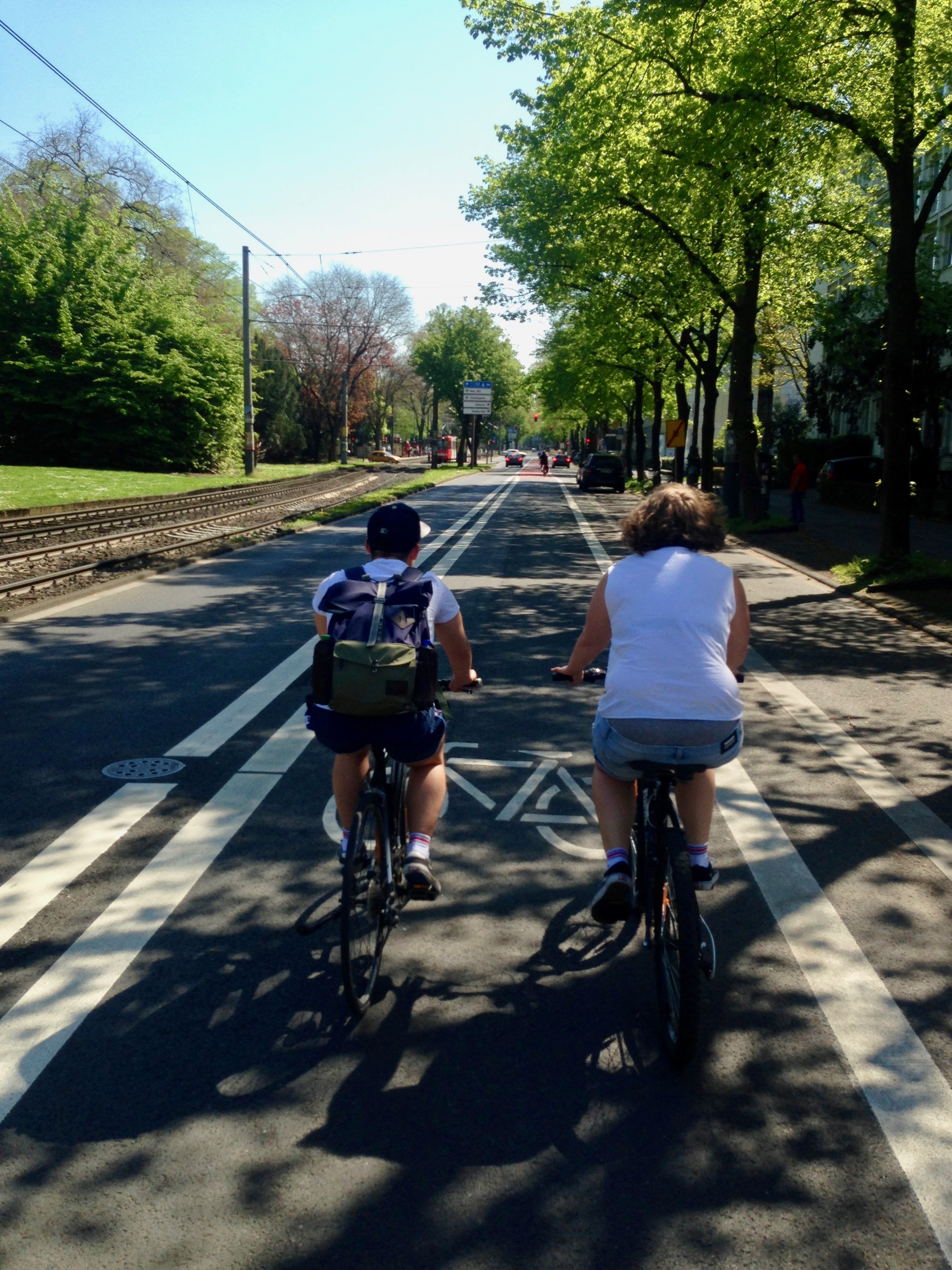 Radfahrende auf dem Sachsenring in Richtung Ulrepforte nach dem #RingFrei Umbau.